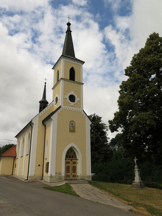 Kaple svaté Anny, Lubná (okres Svitavy).